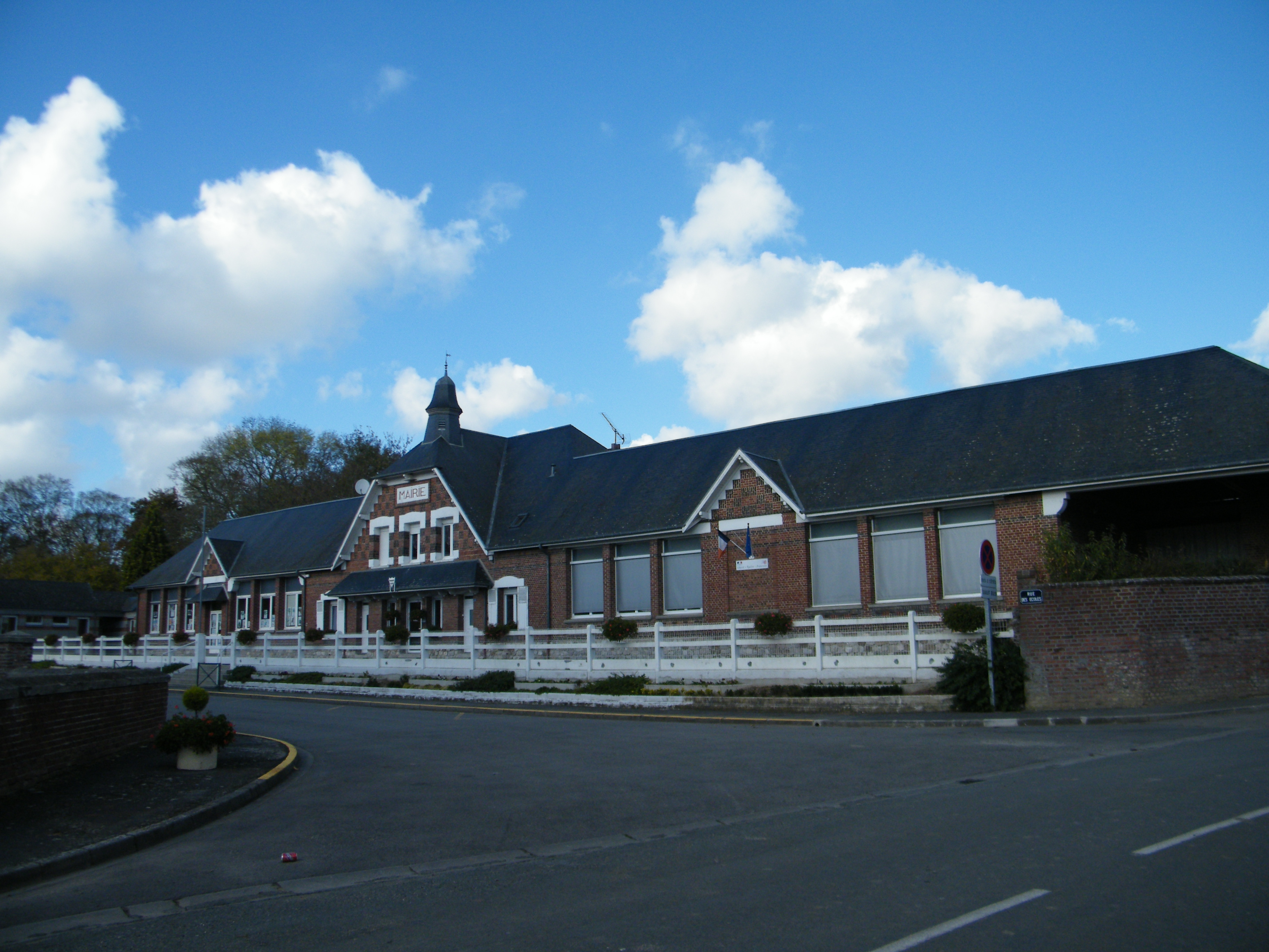 Mairie-école.